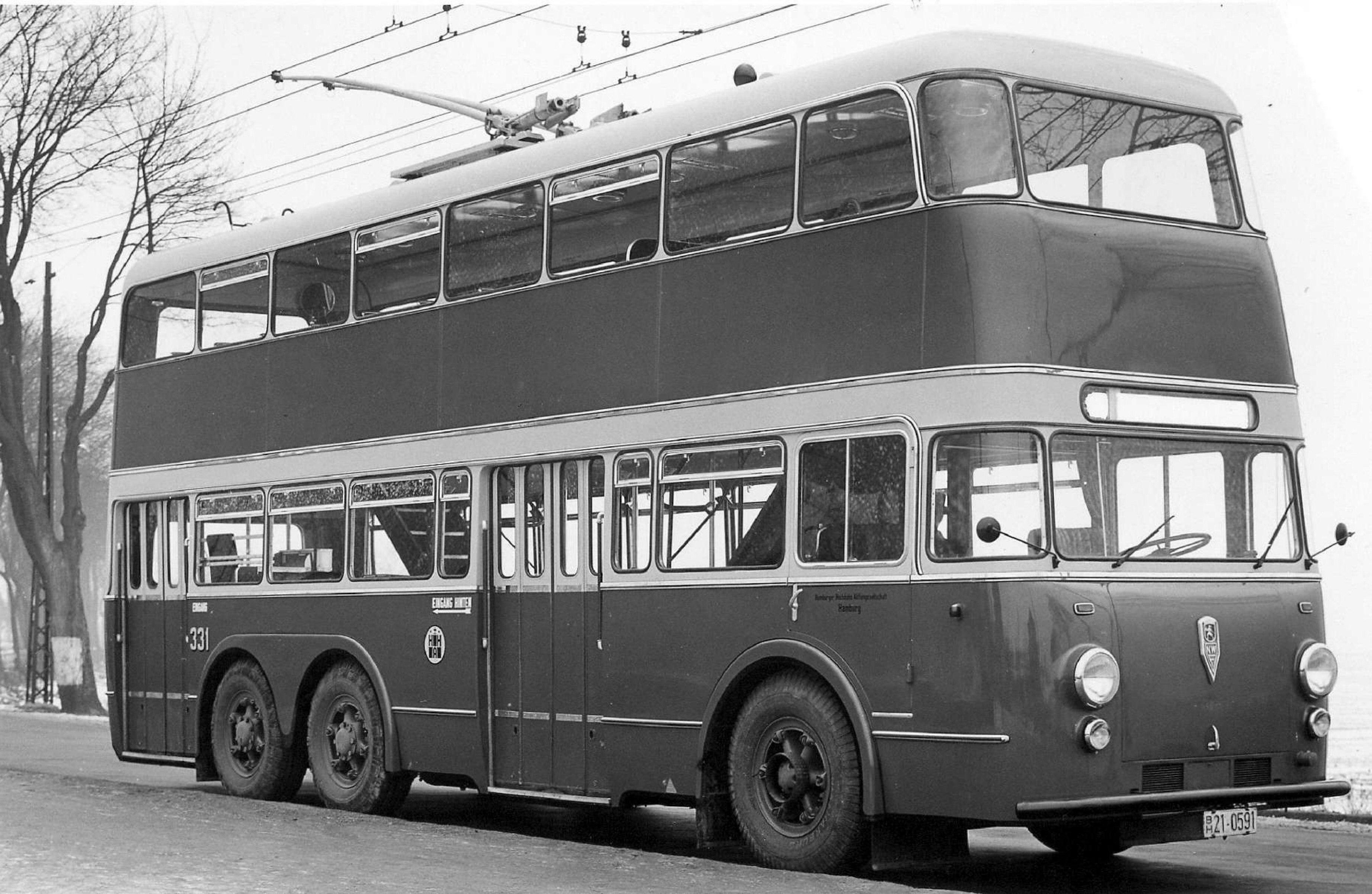 O-Bus in Harburg (Wendepunkt "Fleestedt"): Linie O-4 bzw. „43“ (Eissendorf-Bf Harburg-Fleestedt), Modell Henschel/NWF 562 DD (Deutschlands einzige Doppeldecker-O-Busse)